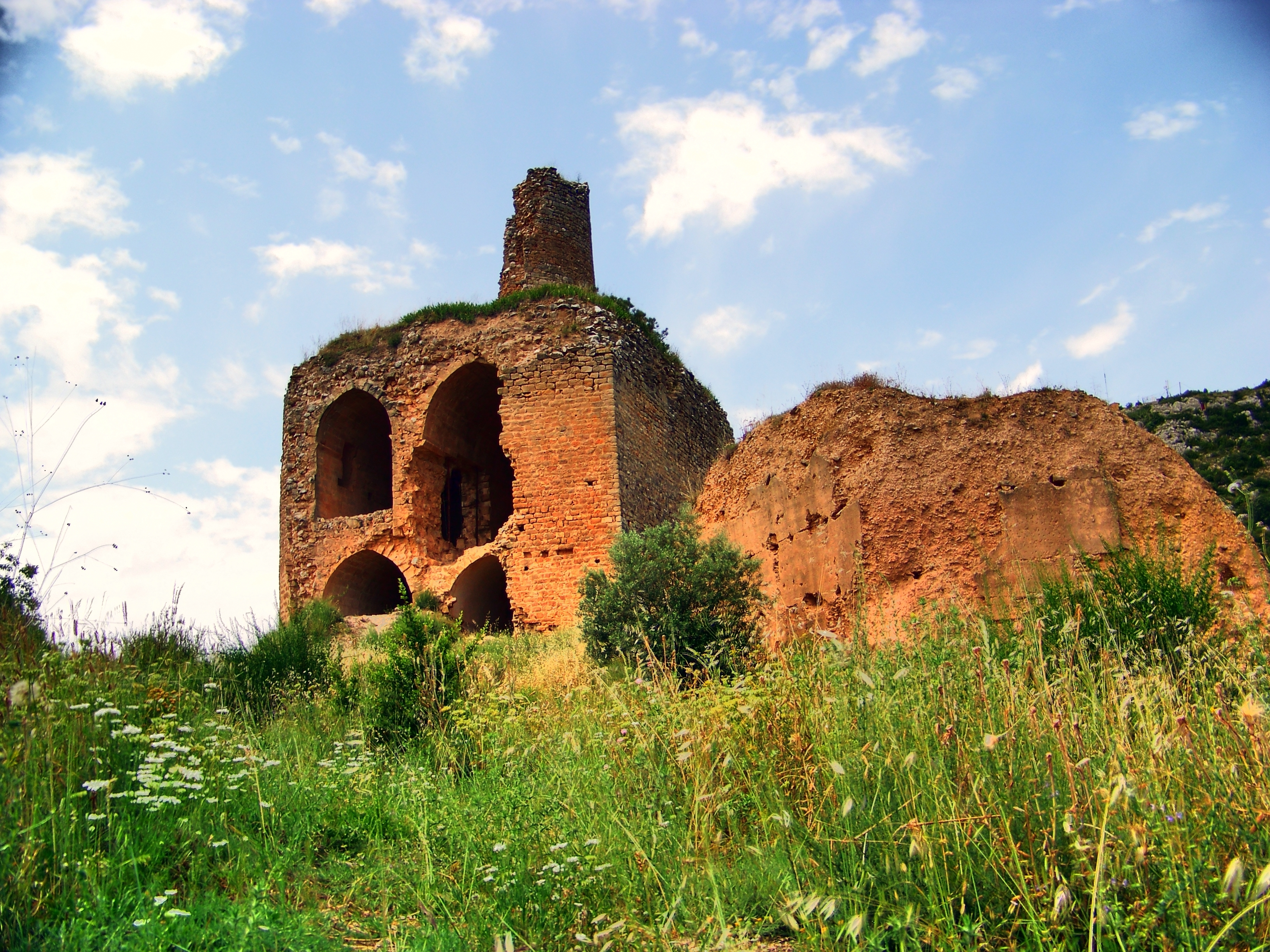 Castell d'Alòs (Alòs de Balaguer)